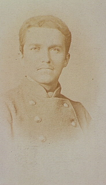 Portrait du sergent Pierre Bourgeois fusillé à Satory en 1871.